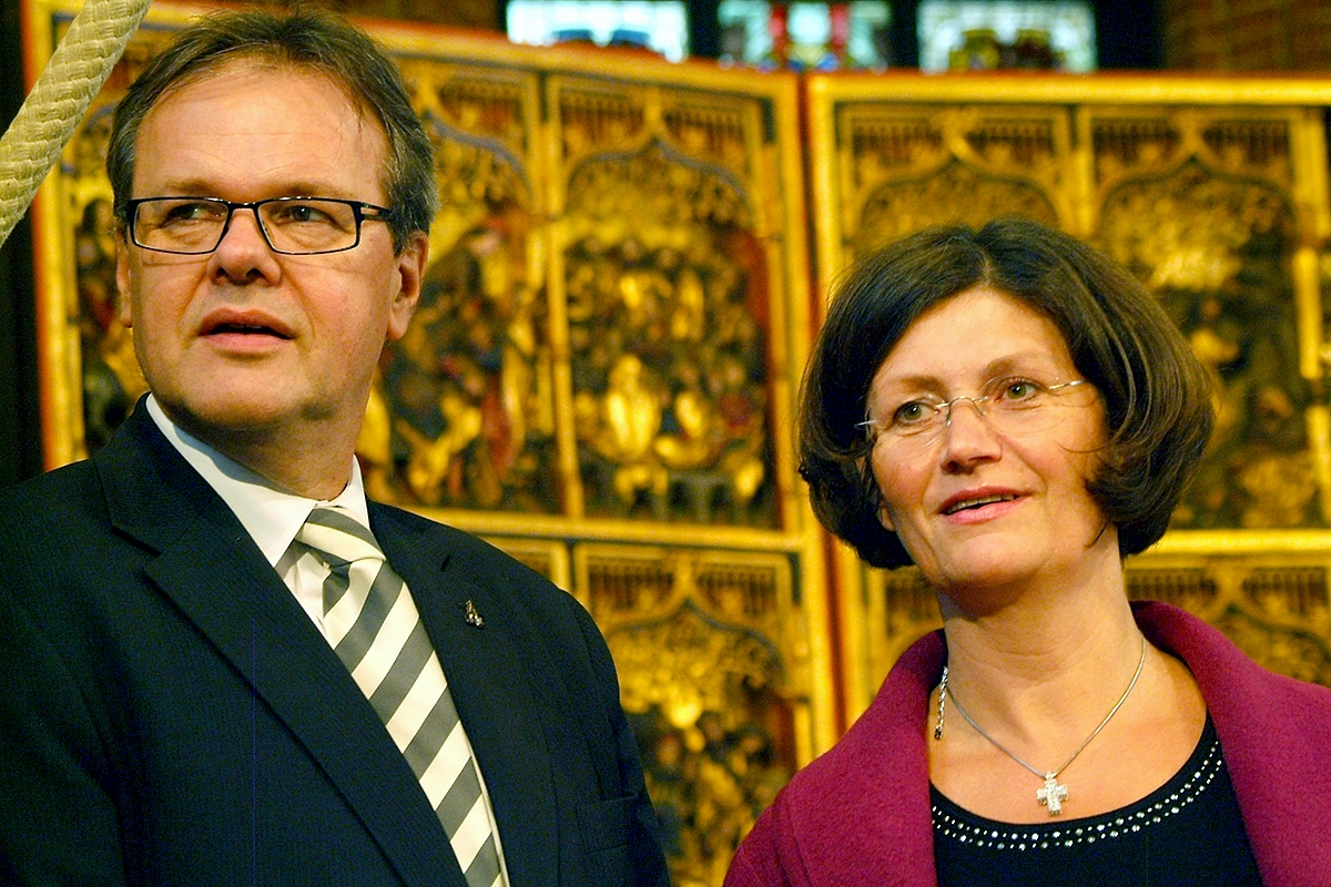 Hans-Martin Heinemann, Stadtsuperintendent von Hannover, und Hanna Kreisel-Liebermann, Pastorin in der Marktkirche, blicken in ebendieser beinahe "ungläubig" nach rechts: Ist das etwa ein Elefant, in den sich einige Kinder vom Kinderzirkus Giovanni da hinten verwandeln? ...